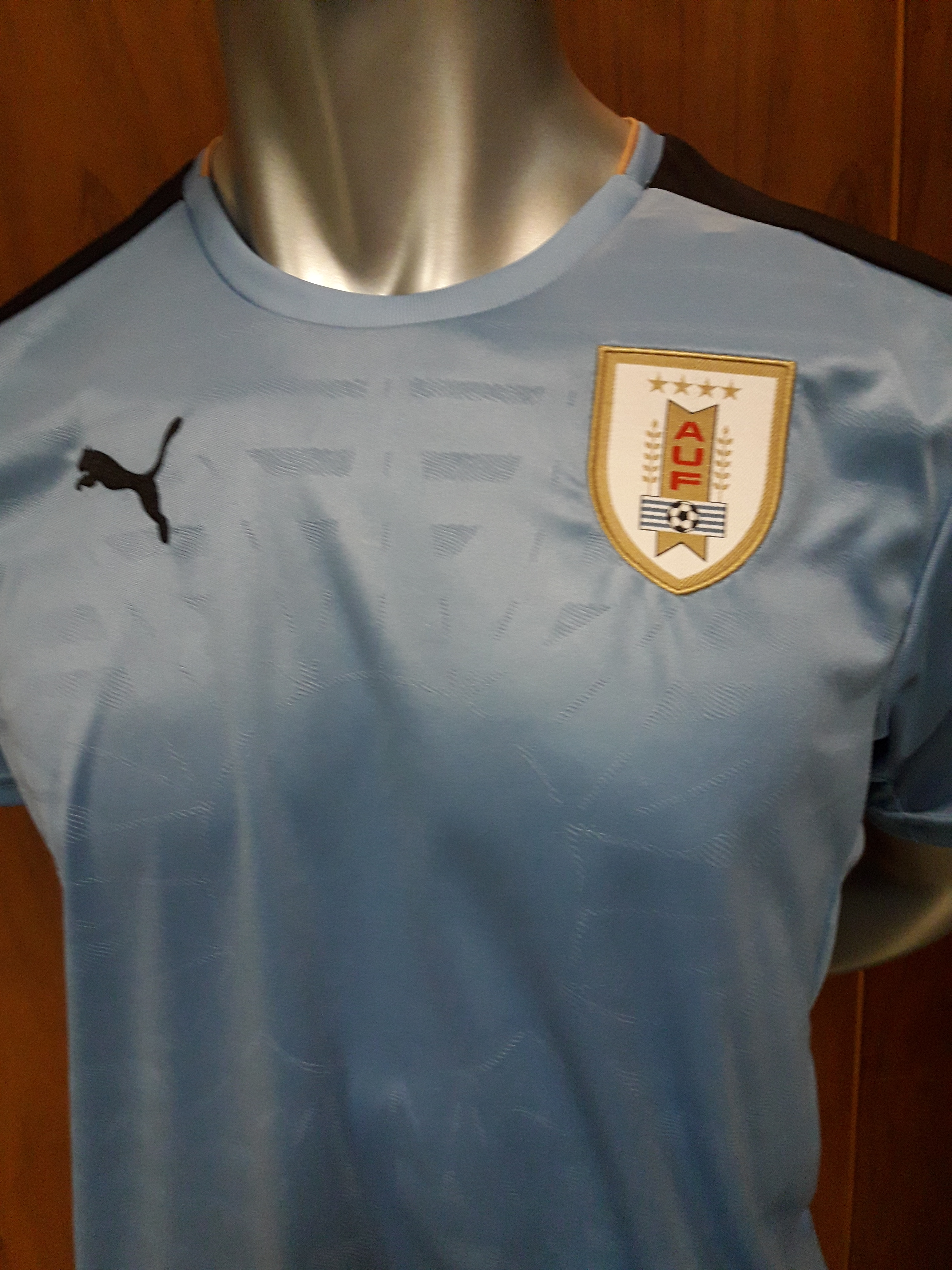 Camiseta de Uruguay